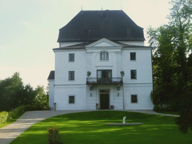 Schloss Wolfsegg mit Wirtschaftsgebäude